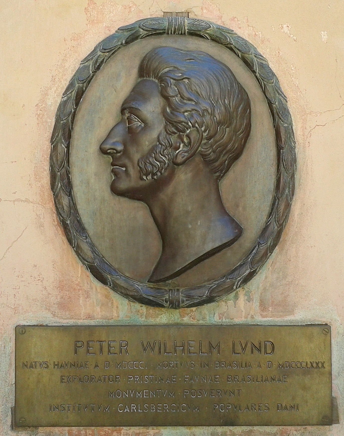 Português do Brasil: Placa em homenagem a Peter Wilhelm Lund, Museu Nacional/UFRJ, Rio de Janeiro, Brasil.